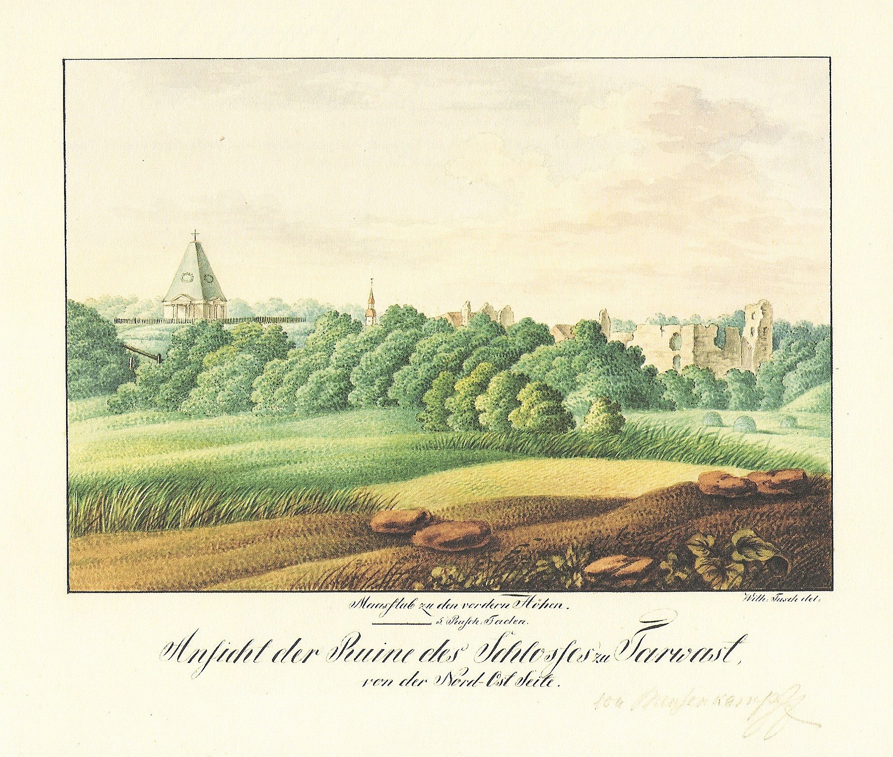 Tarvastu linnuse vaade kirdest